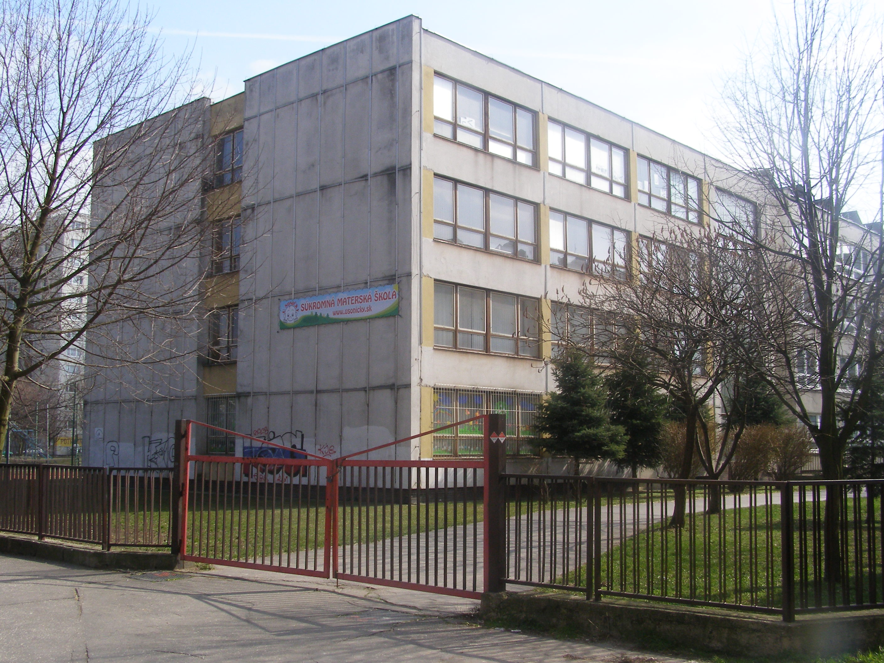 School in Tupolevova street, Bratislava